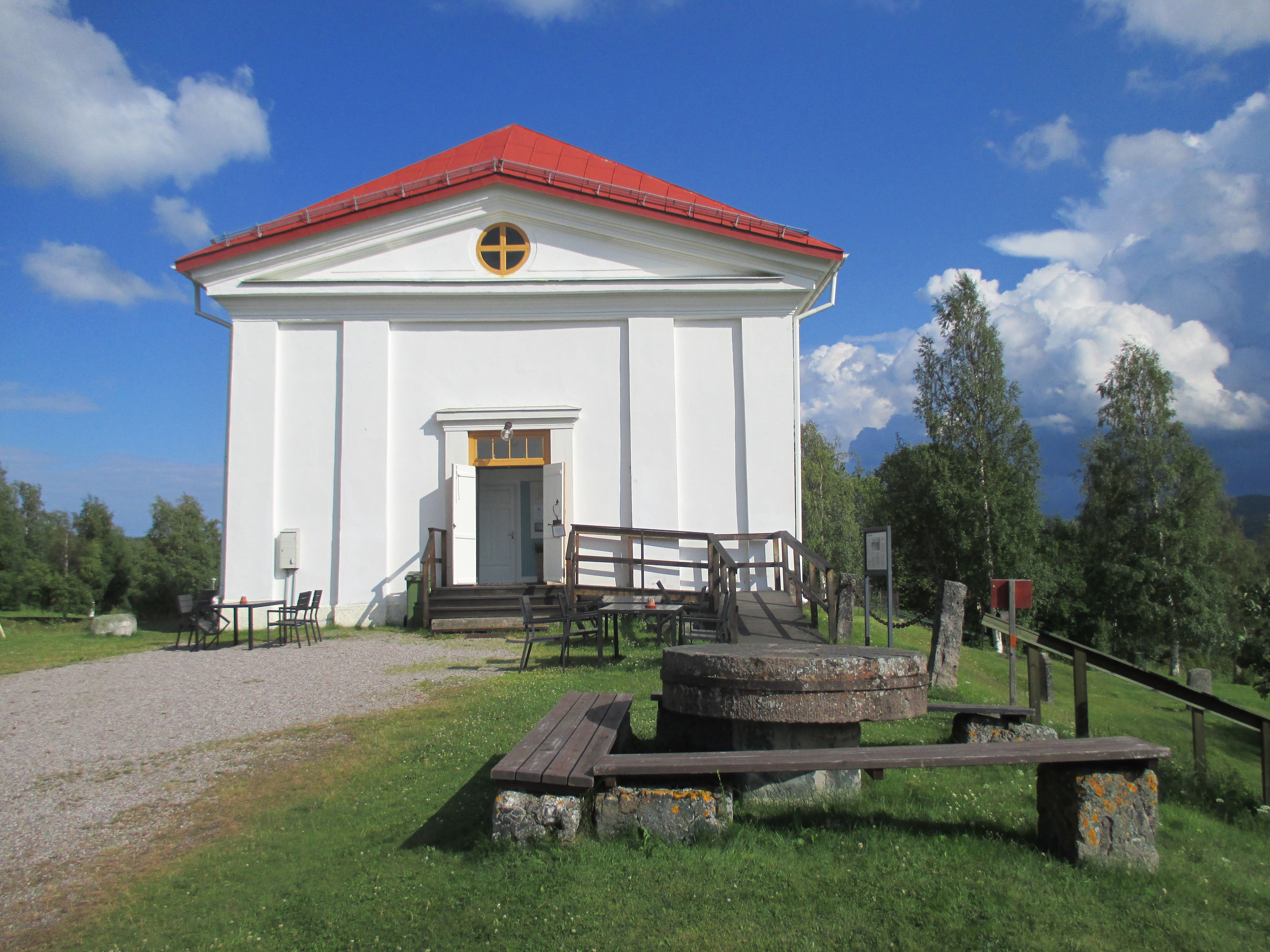 Bunges kapell i Åmot, Ockelbo kommun, Gästrikland, Gävleborgs län, Sverige.